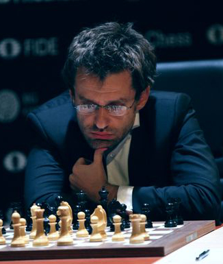 Левон Аронян, Турнир Претендентов 2018